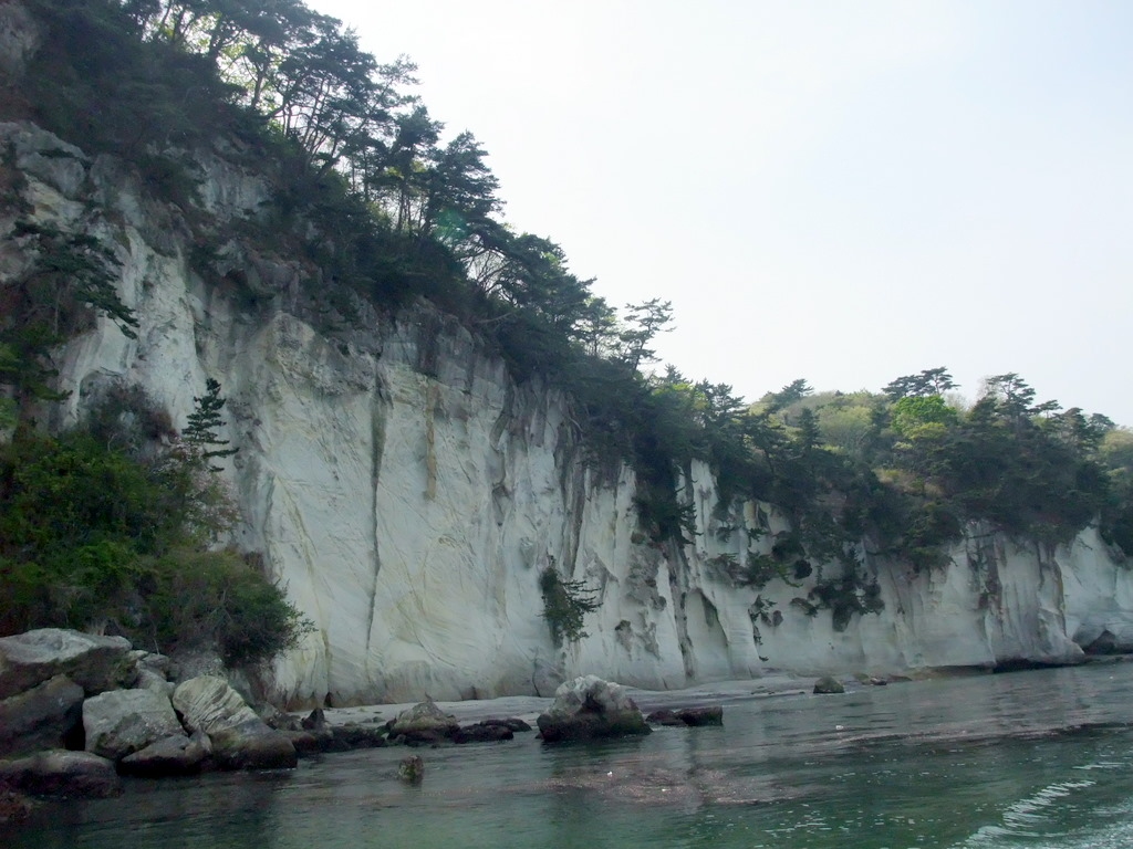 Sagakei at Miyatojima in Oku-Matsushima